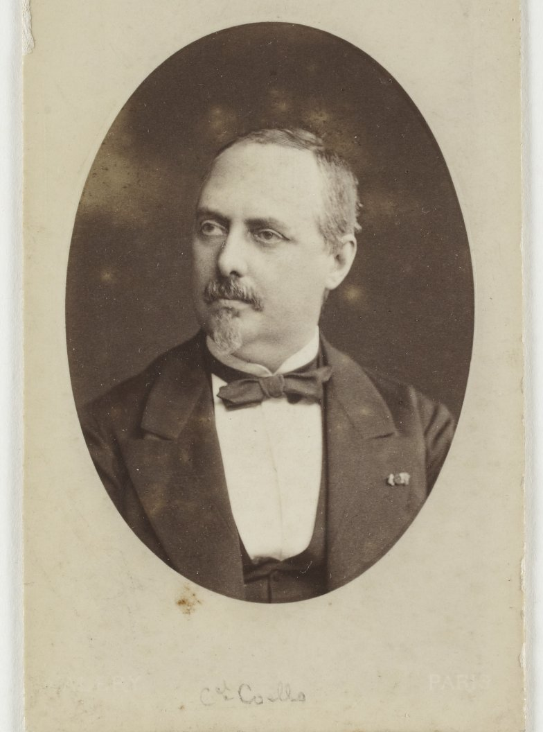 Retrato de Francisco Coello.